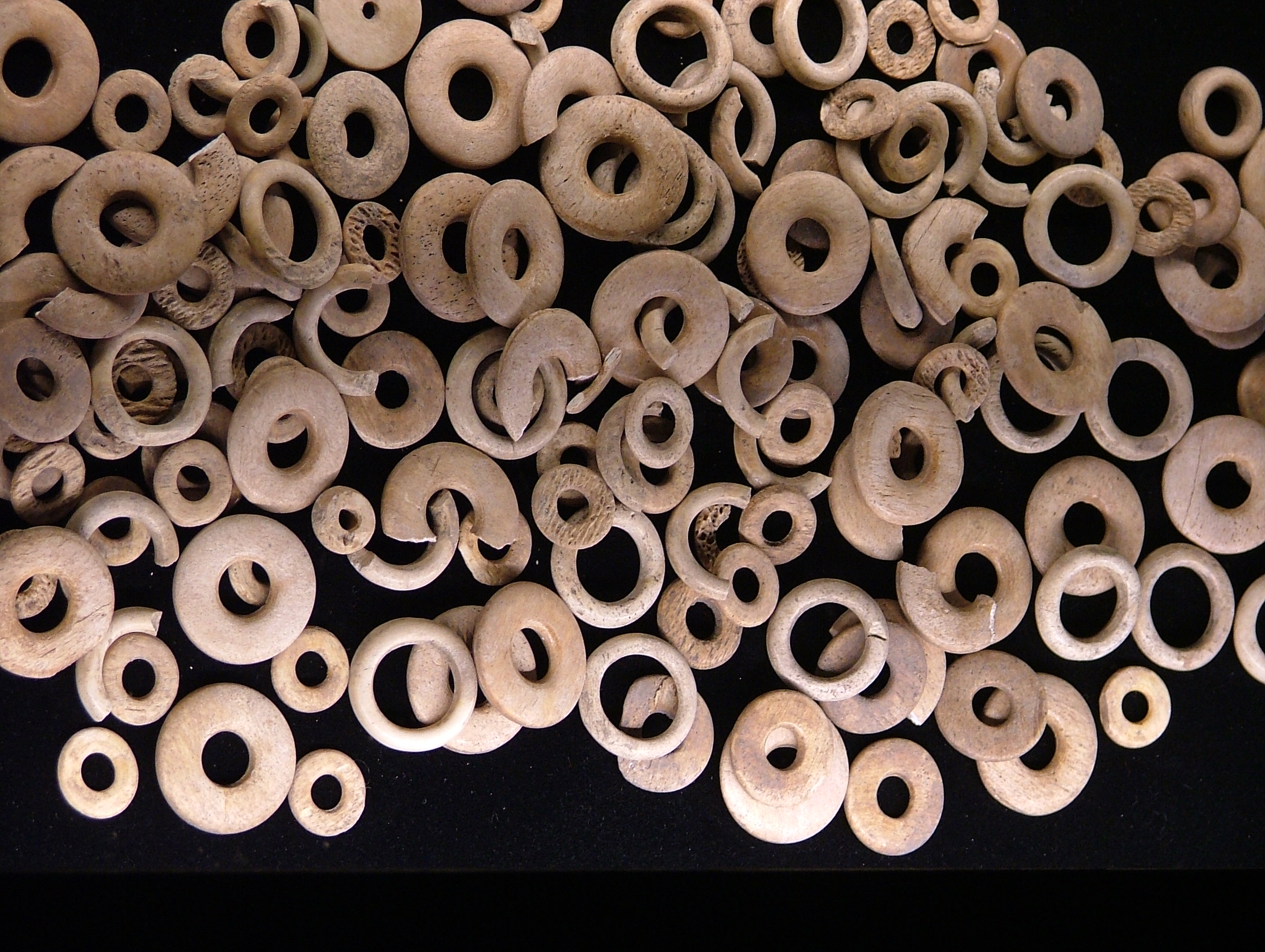 Paternosterringe als Grabbeilage / Grabbeigabe für die Toten